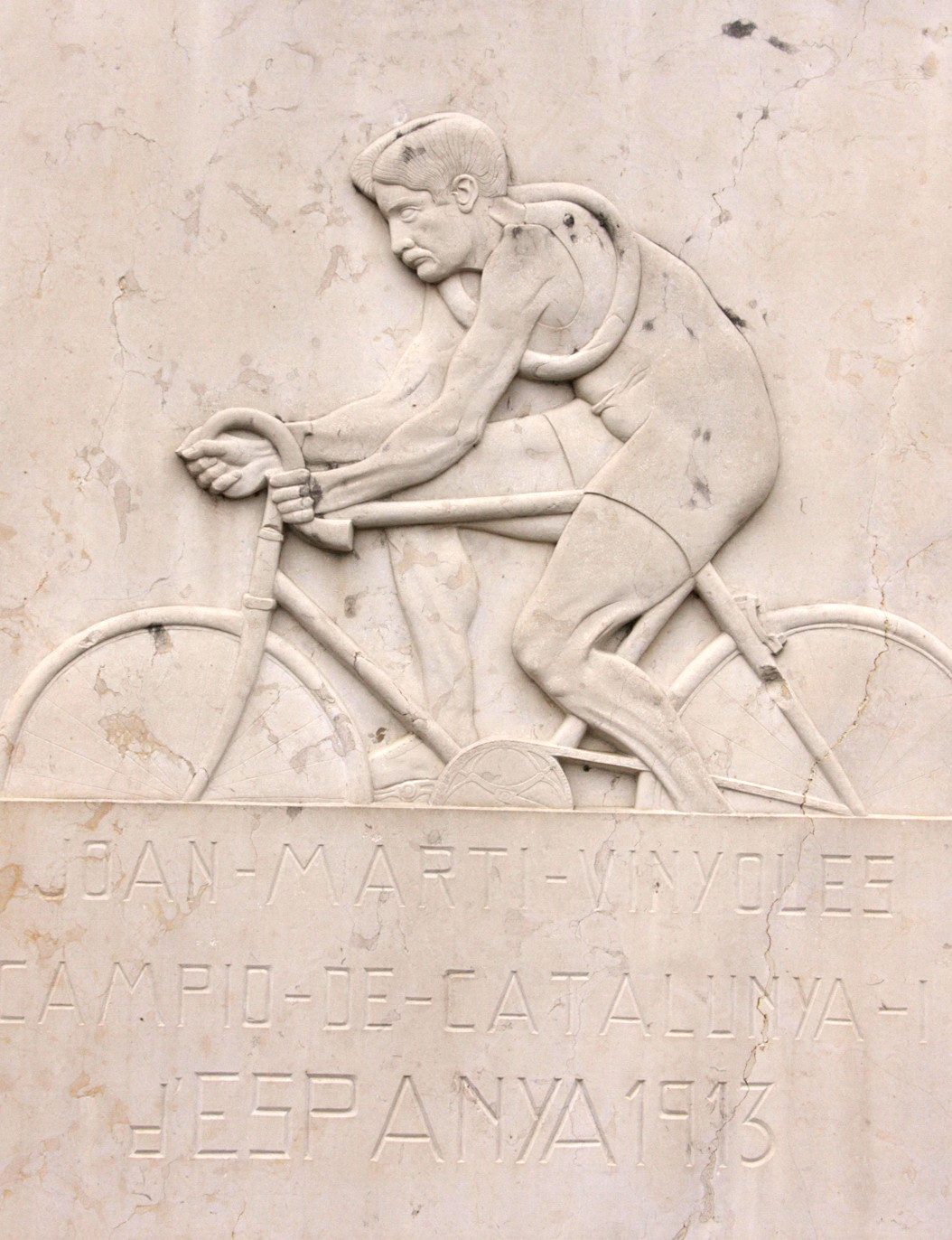 Mausoleu de Joan Martí i Viñolas al cementiri de la Doma (la Garriga-Catalunya). Campió de Catalunya i Espanya el 1913